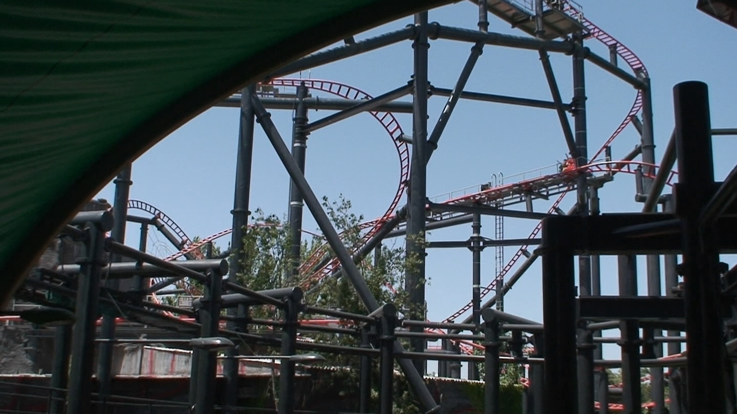 The roller coaster Tarantula at Parque de Atracciones de Madrid